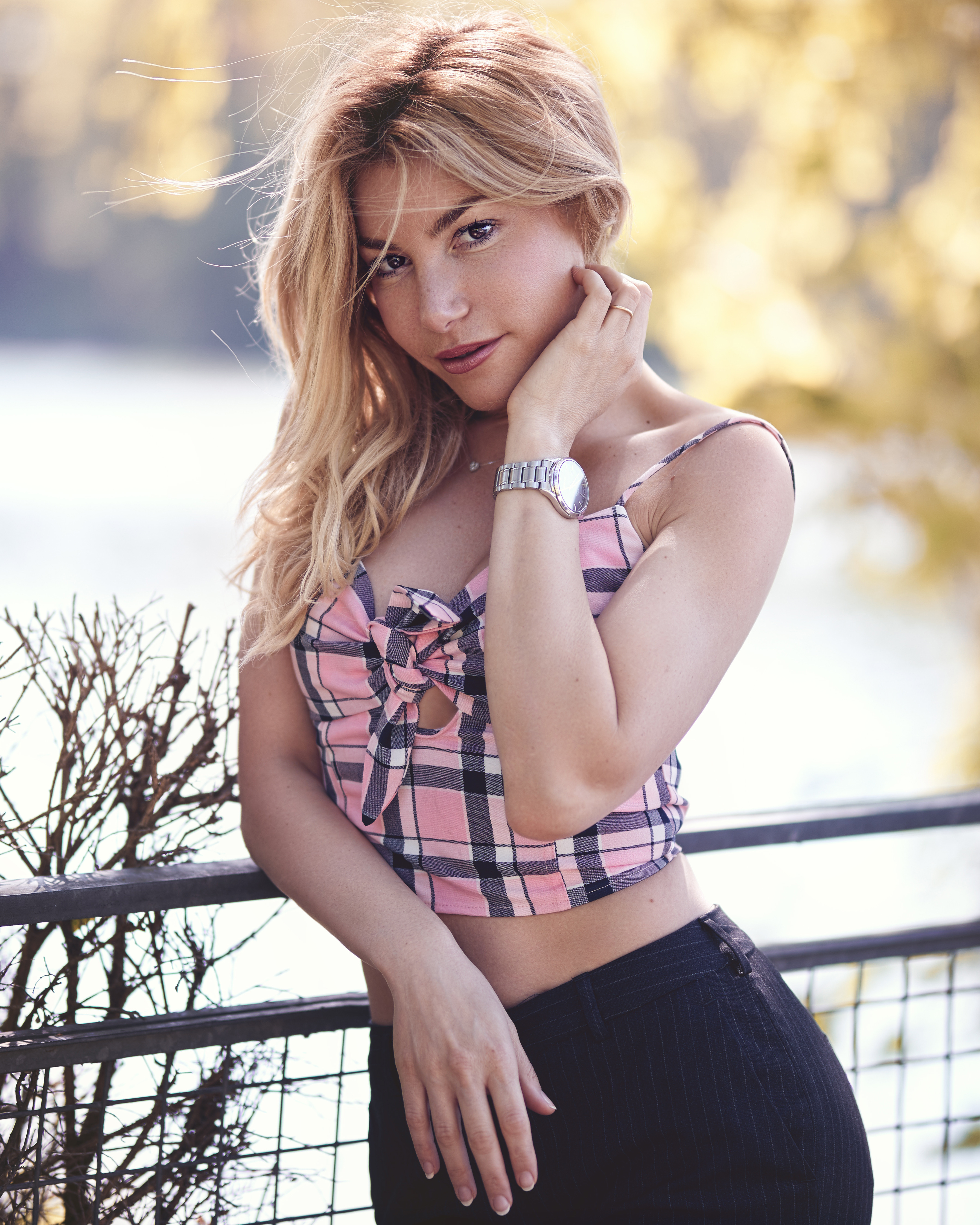 Lola Marois en séance photo à Paris.